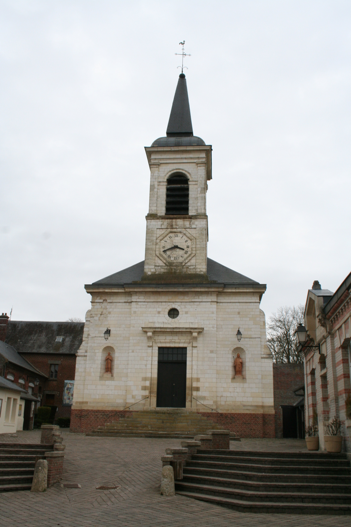 Picard: Église éd Tézin-Glimont, Sonme, Picardie